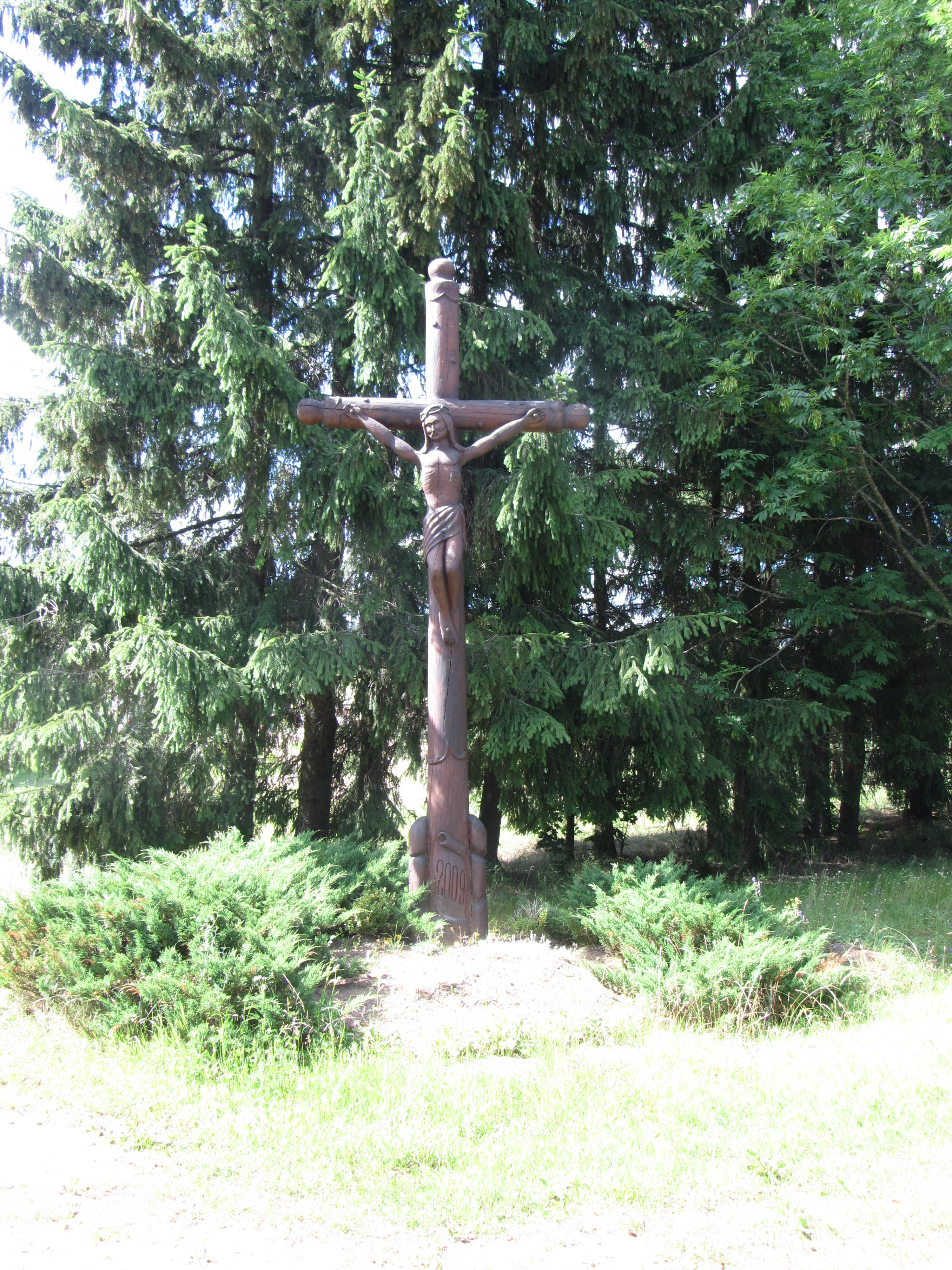 Lygumai II 18105, Lithuania